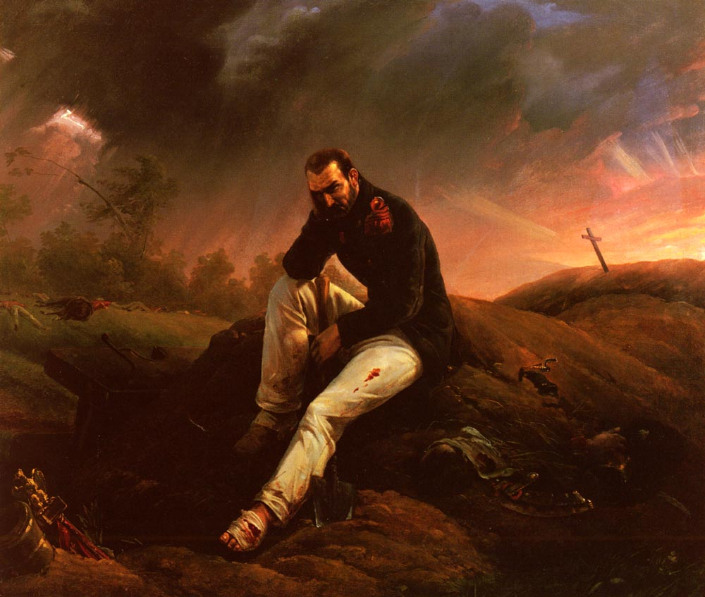 Le dernier grenadier de Waterloo (The Last Grenadier of Waterloo)